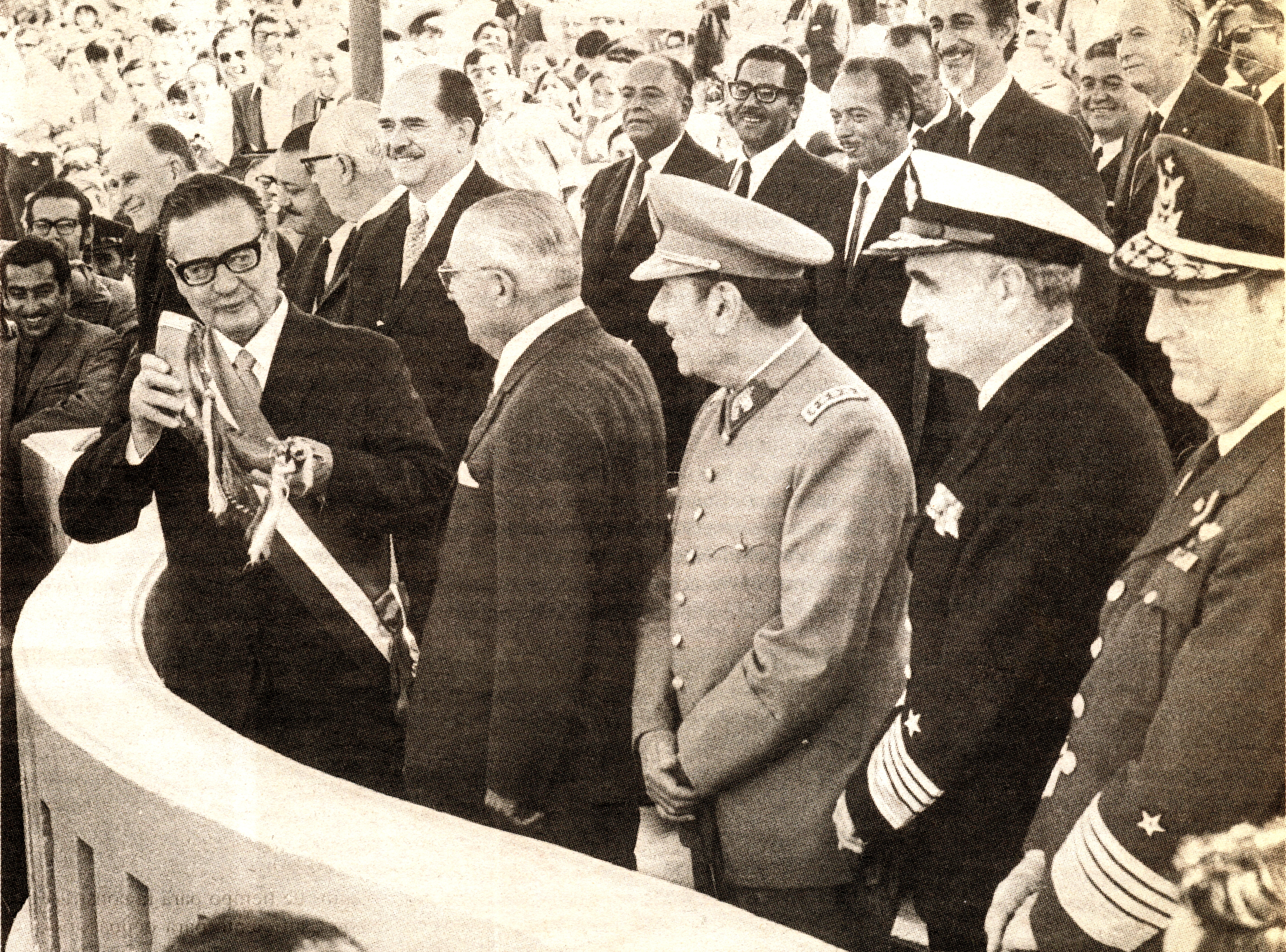 Presidente de Chile (1970 - 1973) Salvador Allende en el brindis durante la Parada Militar realizada en el entonces Parque Cousiño. Cerca de el: Carlos Prats, Pedro Vuskovic, José Tohá, Raúl Silva Henríquez, César Ruiz Danyau (Fach), Raúl Montero Cornejo (Armada)